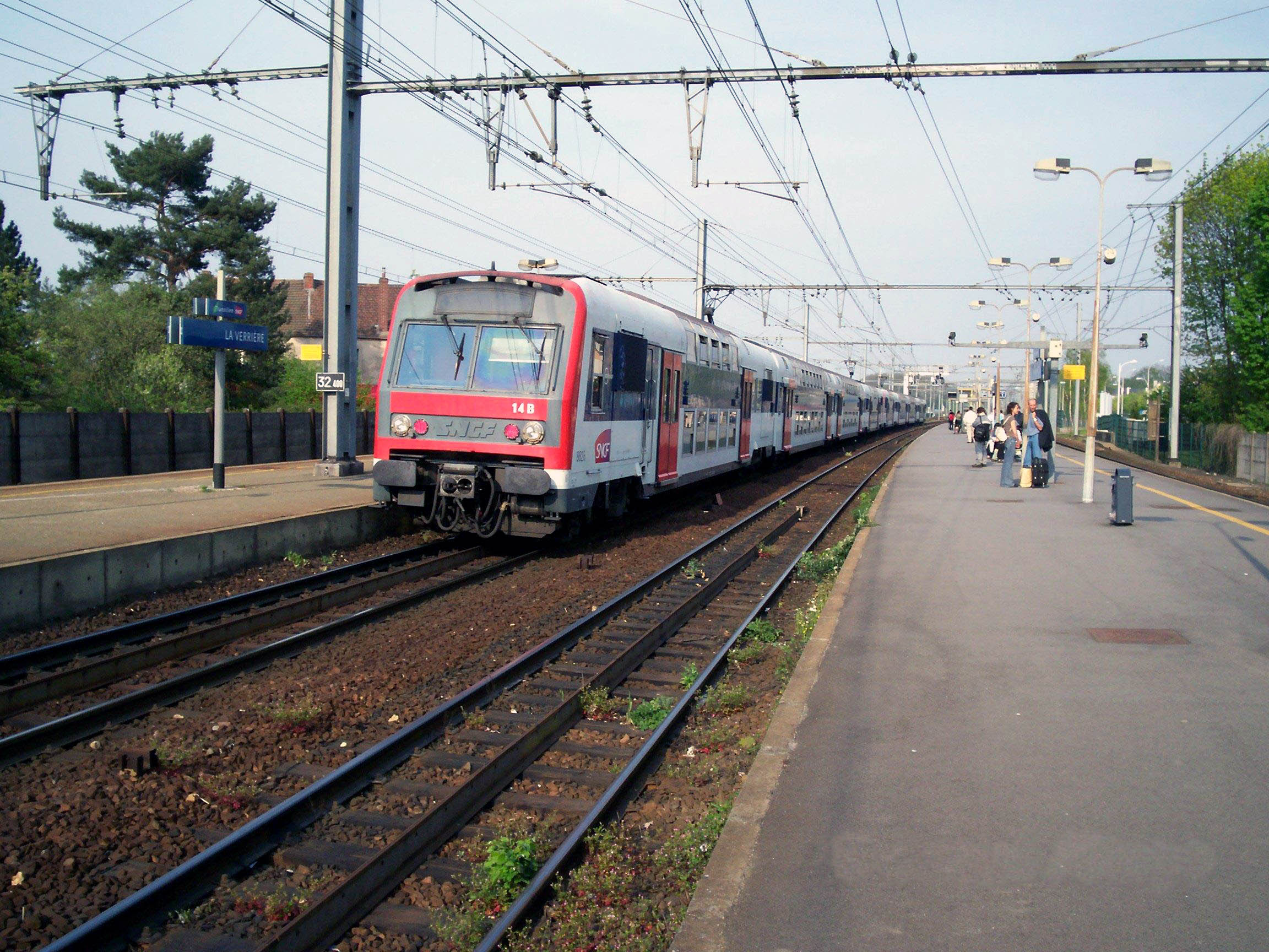 Rame Z8800, vue de l'arrière, en gare de La Verrière assurant la mission DEFI